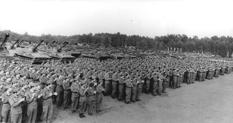 DDR, NVA-Truppenbesuch, Honecker ADN-ZB Mittelstädt 21.6.84 DDR: Truppenbesuch- Soldaten, Unteroffiziere, Fähnriche und Offiziere aller Waffengattungen der Landstreitkräfte bekunden während des Kampfmeetings zum Abschluß des Truppenbesuchs ihre feste Verbundenheit mit der SED, seinem Zentralkomitee und dessen Generalsekretär, Erich Honecker.